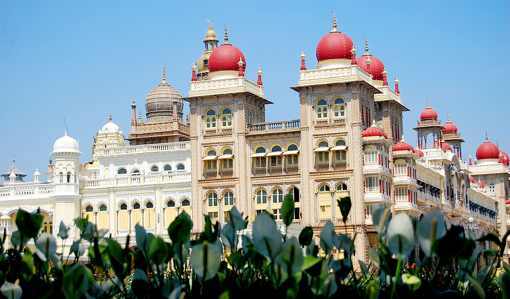 മൈസൂർ കൊട്ടാരം